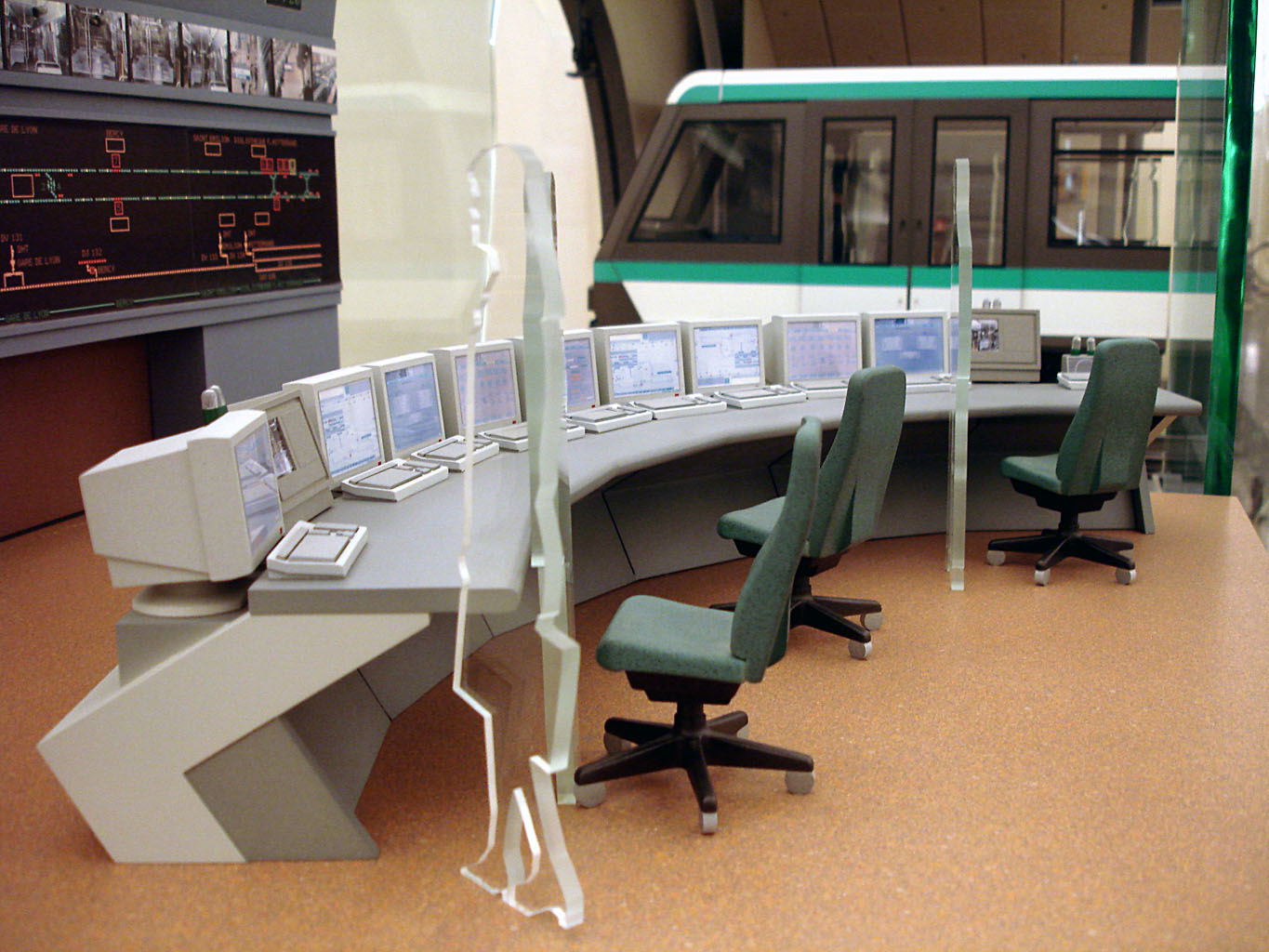 Maquette du PCC de la ligne 14 du métro de Paris, musée des Arts et Métiers, Paris, France.